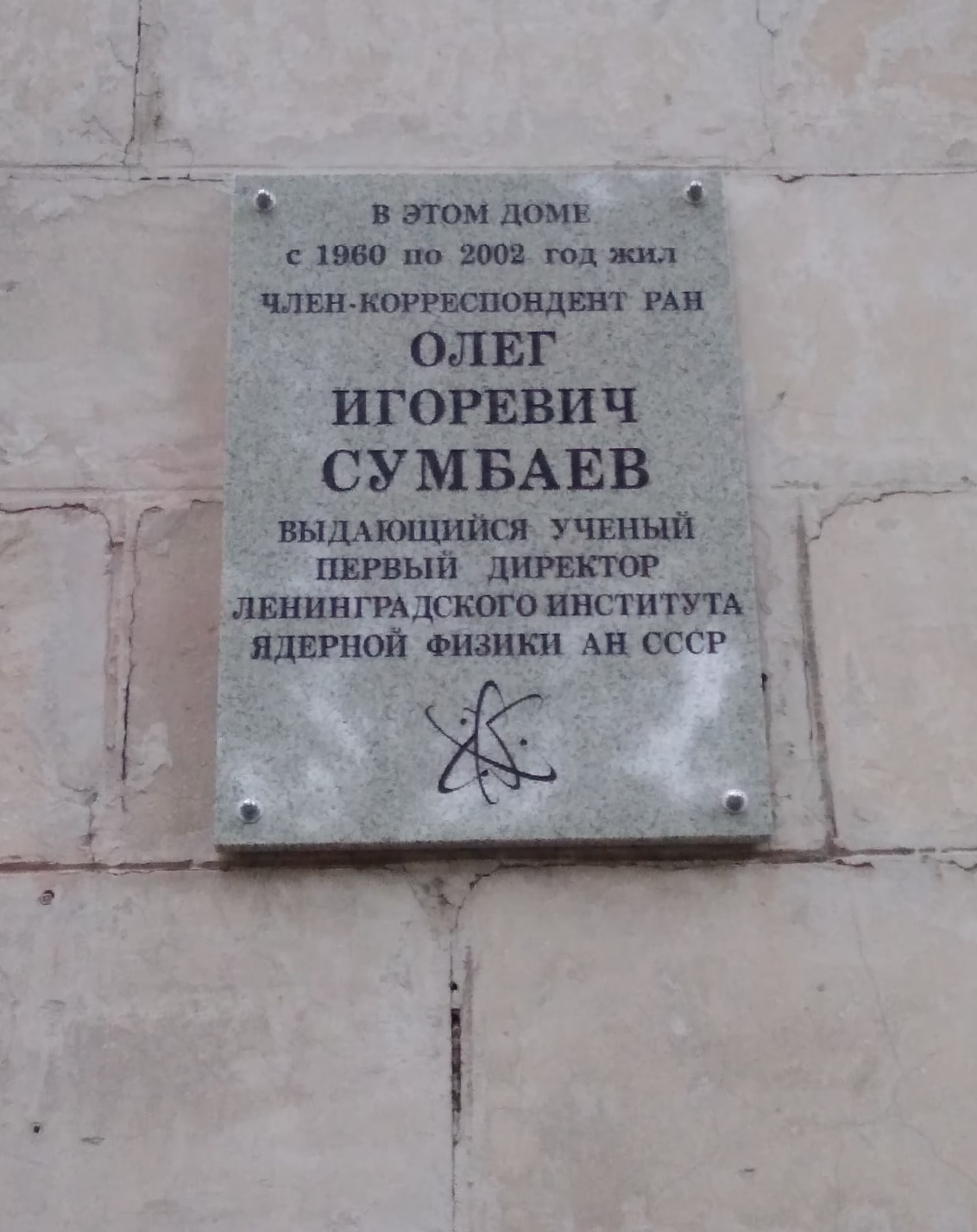 Мемориальная доска Сумбаеву Олегу Игоревичу на доме, в котором он жил в Гатчине